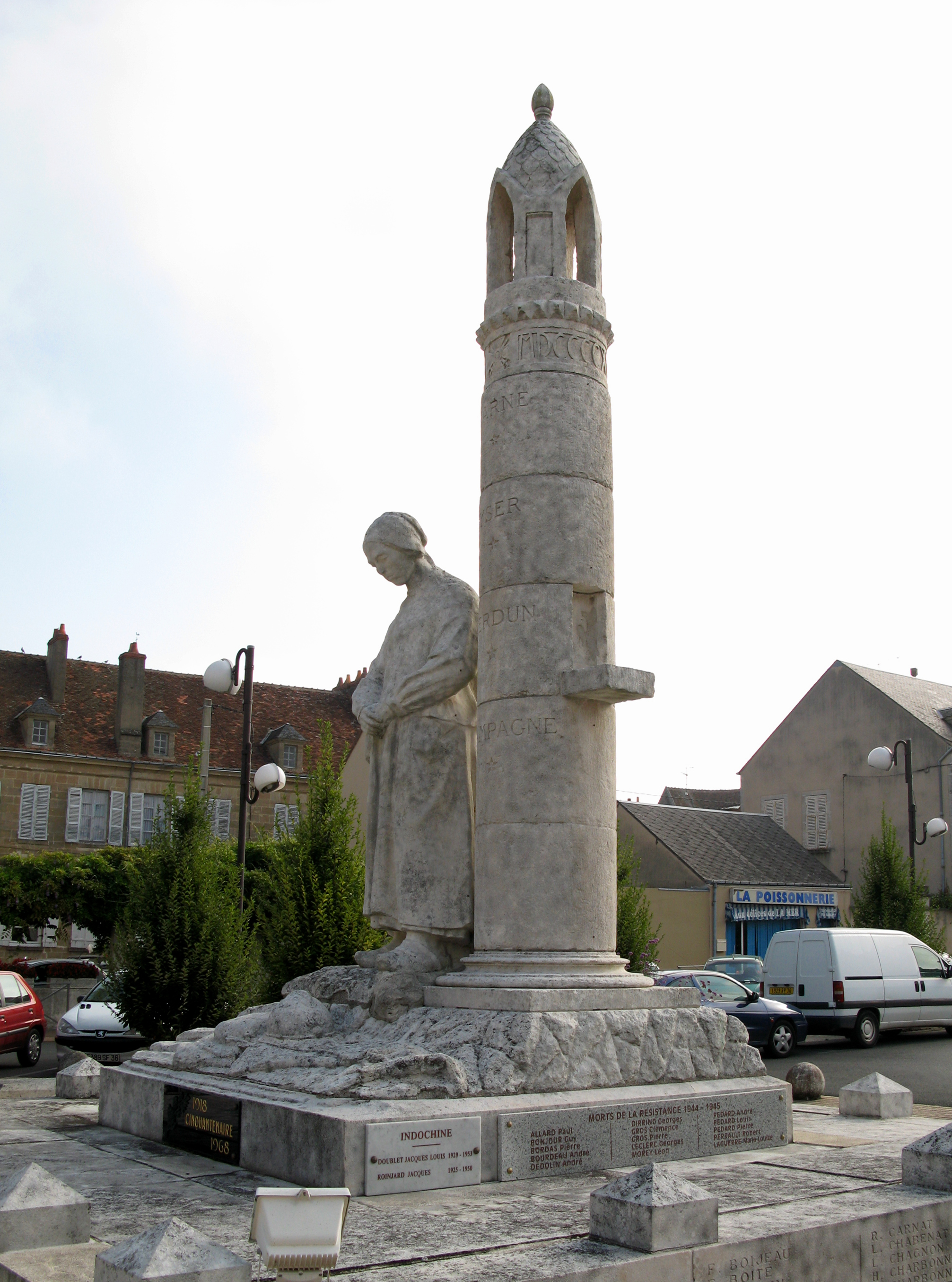 La Châtre (Indre, France) - Monument-aux-morts ayant la particularité de représenter une lanterne des morts. . .